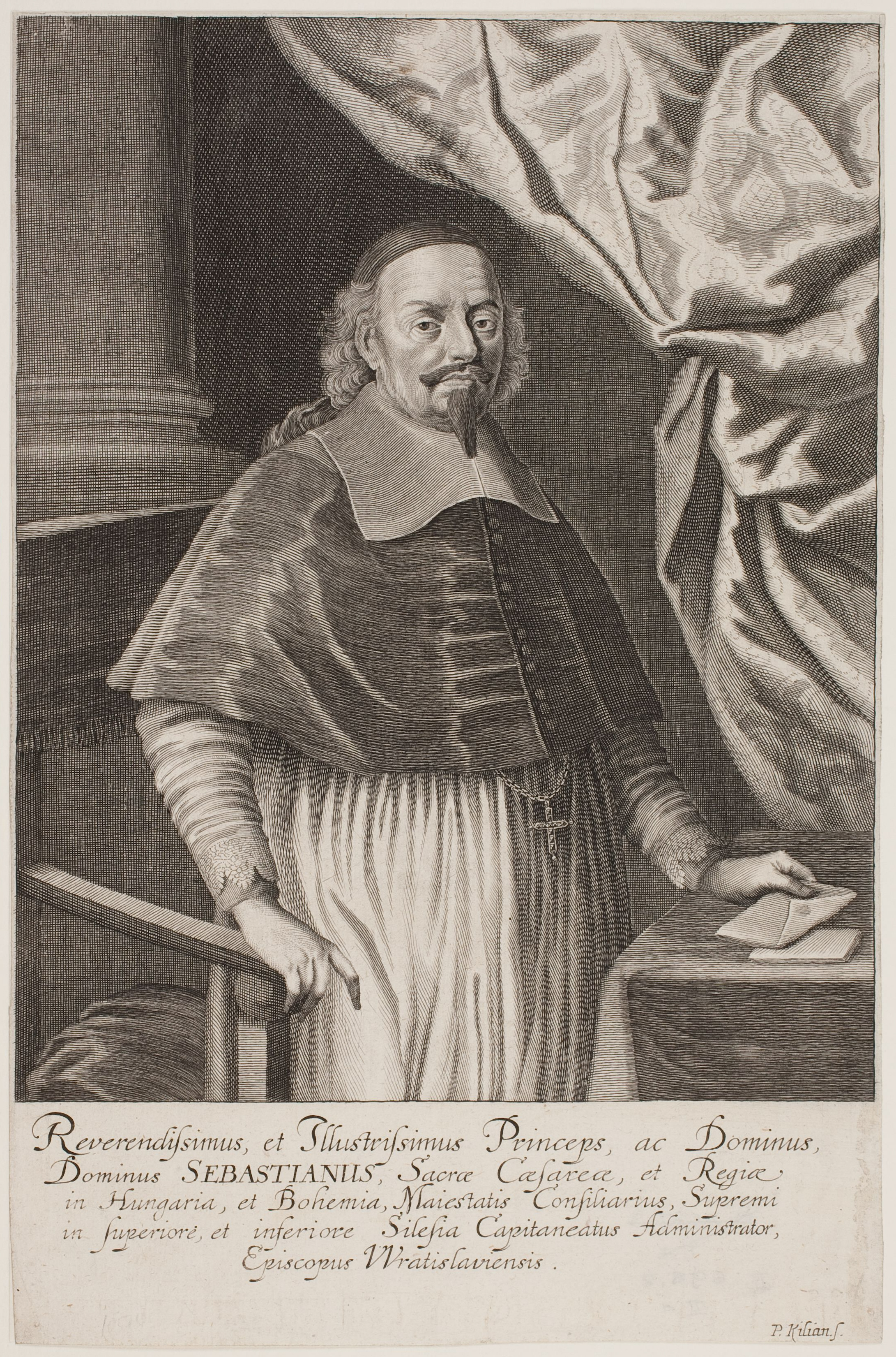 Portrait des Breslauer Bischofs Sebastian von Rostock; Kupferstich, 288 x 188 mm (Blatt); Wolfenbüttel, Herzog August Bibliothek, Inventar-Nr. A 25563